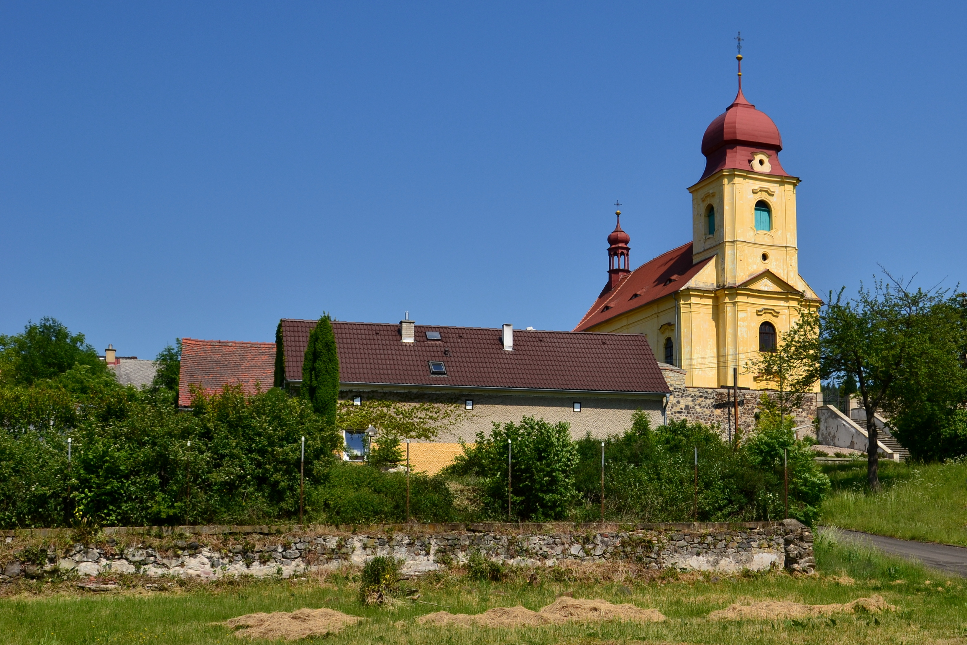 Střed vesnice s kostelem svatého Prokopa